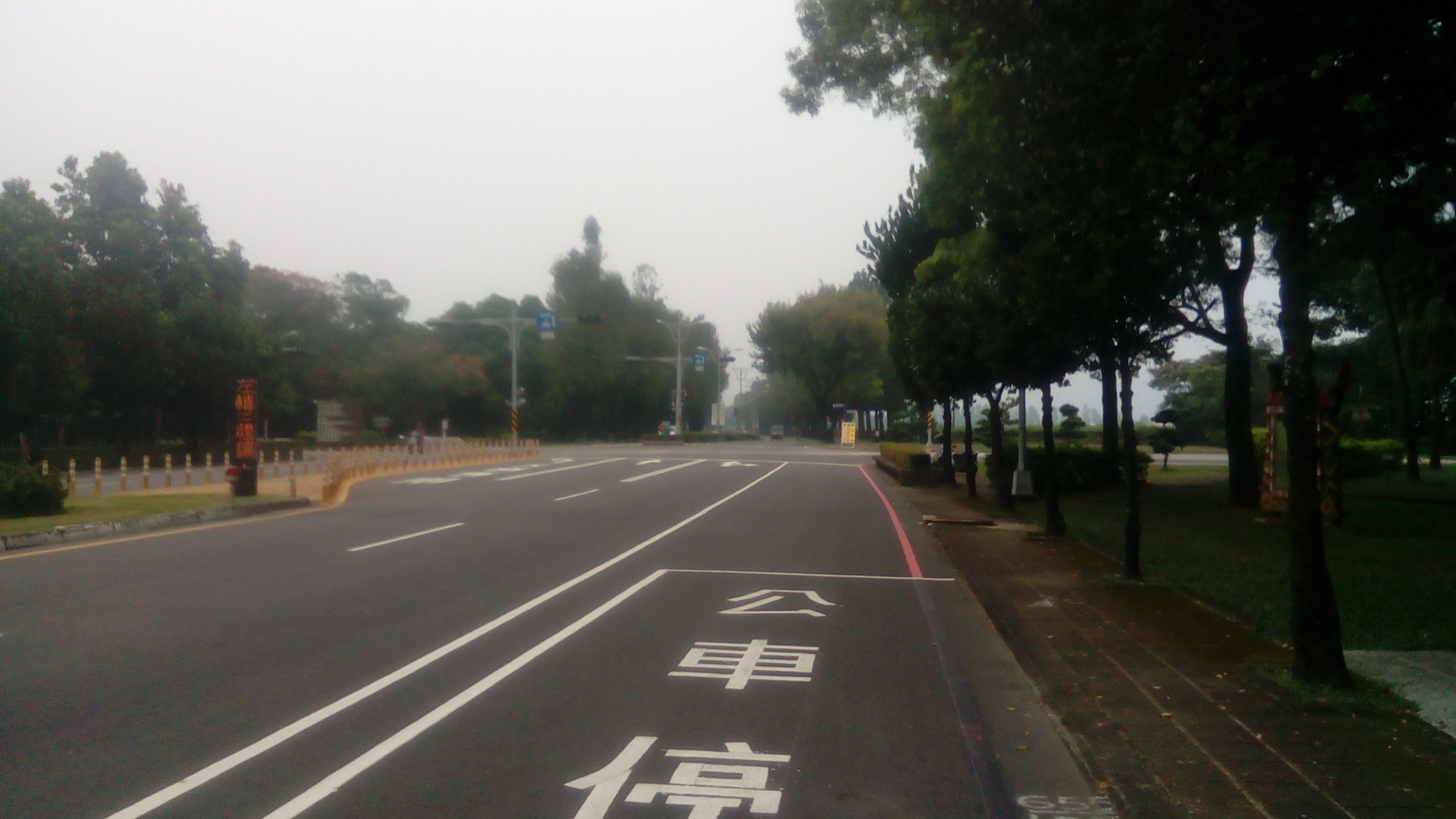 獸醫館前所攝